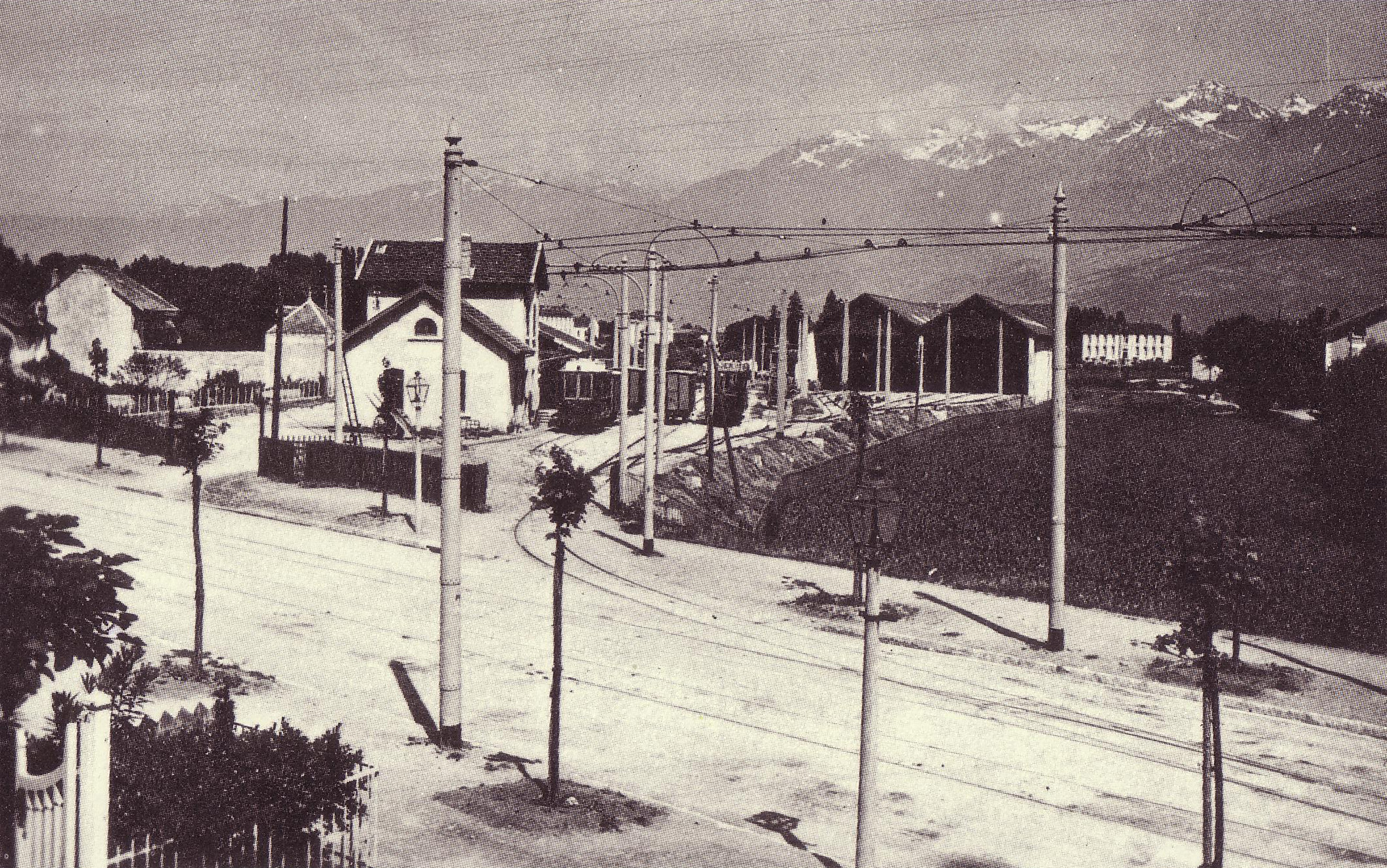 Dépot du Tramway Grenoble - Chapareillan à l'Île Verte (Grenoble). Au premier plan, l'actuel avenue Marechal Randon